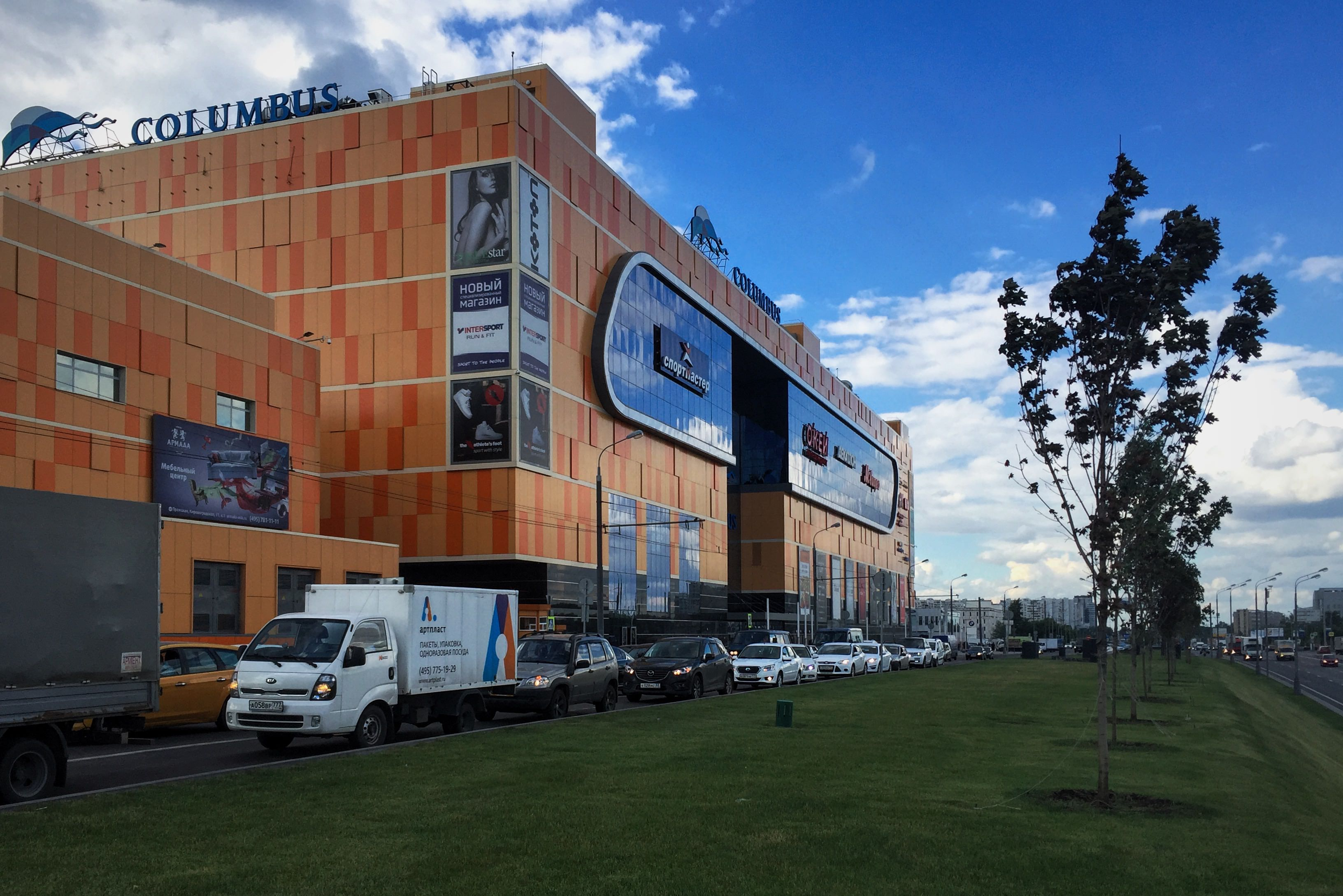 Варшавское шоссе. ТРЦ Колумбус (Кировоградская ул., 13а). Когда-то здесь был большой и неплохой рынок.